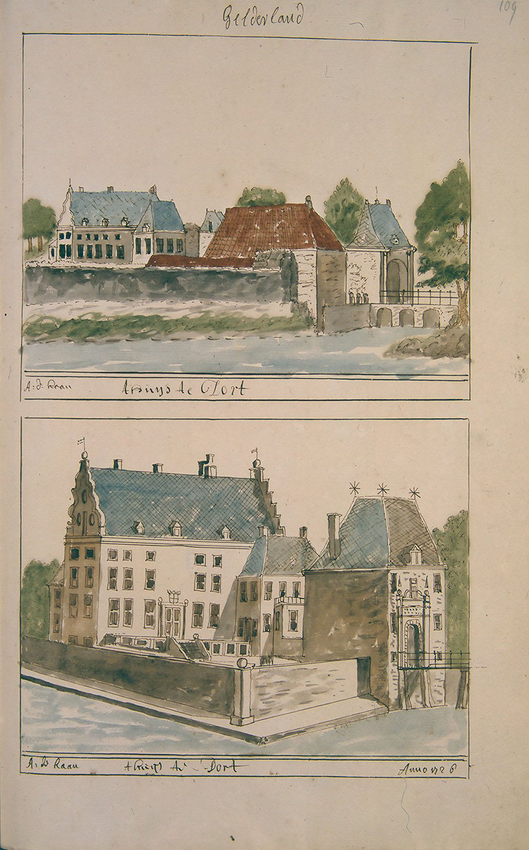 Korte Beschrijving van Overijssel der selven Steeden, dorpen, Vlekken, Buurten, en Castelen alle desselfsverbeelding naar het leven geteekend, door Cornelis Pronk en Anderen met veel moeijte bij een versaameld door Andries Schoemaker